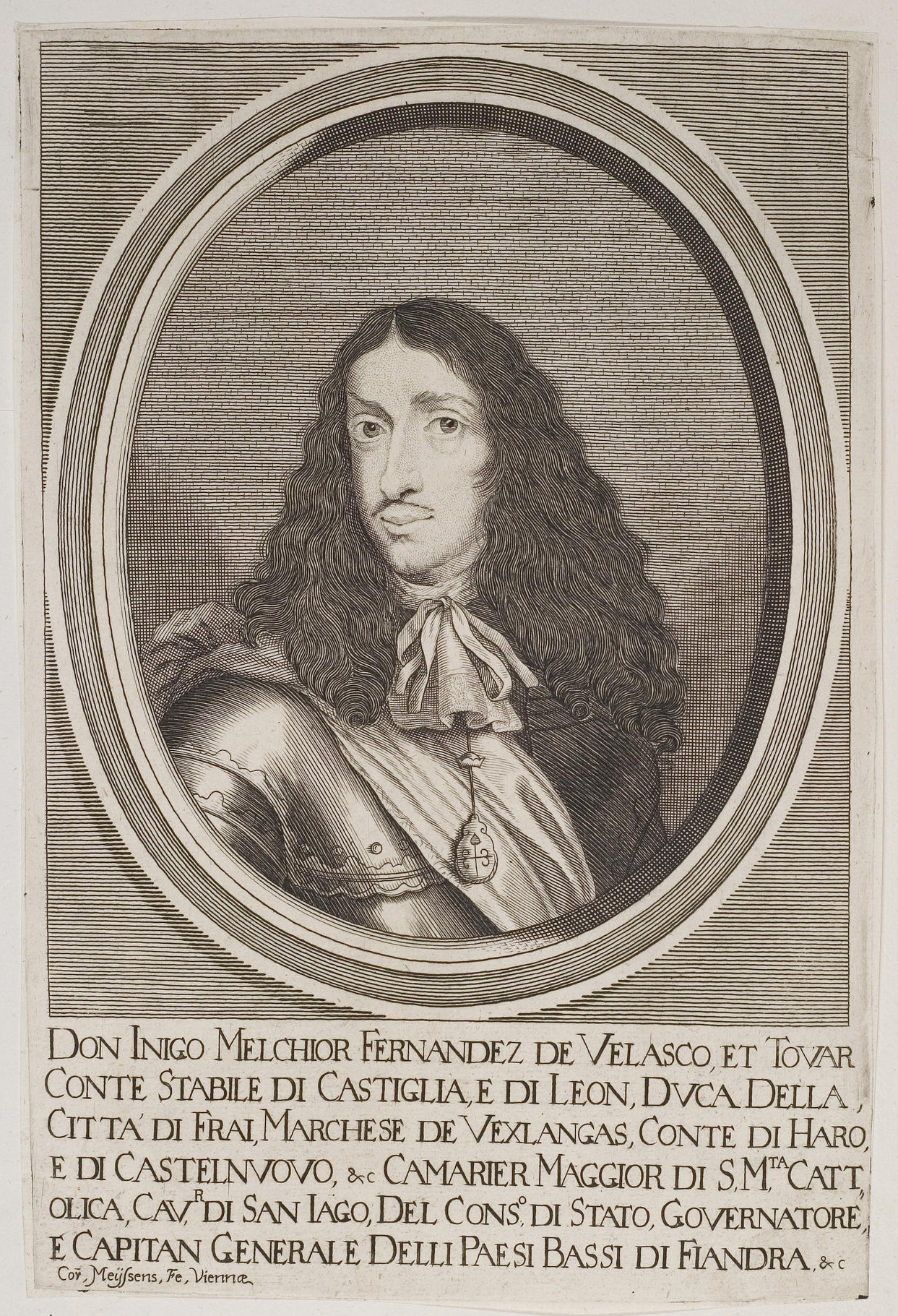 Grafik aus dem Klebeband Nr. 2 der Fürstlich Waldeckschen Hofbibliothek Arolsen Motiv: Íñigo Melchor Fernández de Velasco (1629–1696), spanischer Heerführer und Staatsmann im Dienst von Karl II. von Spanien